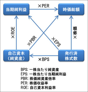 株式に関係する変数の関係をまとめた図。